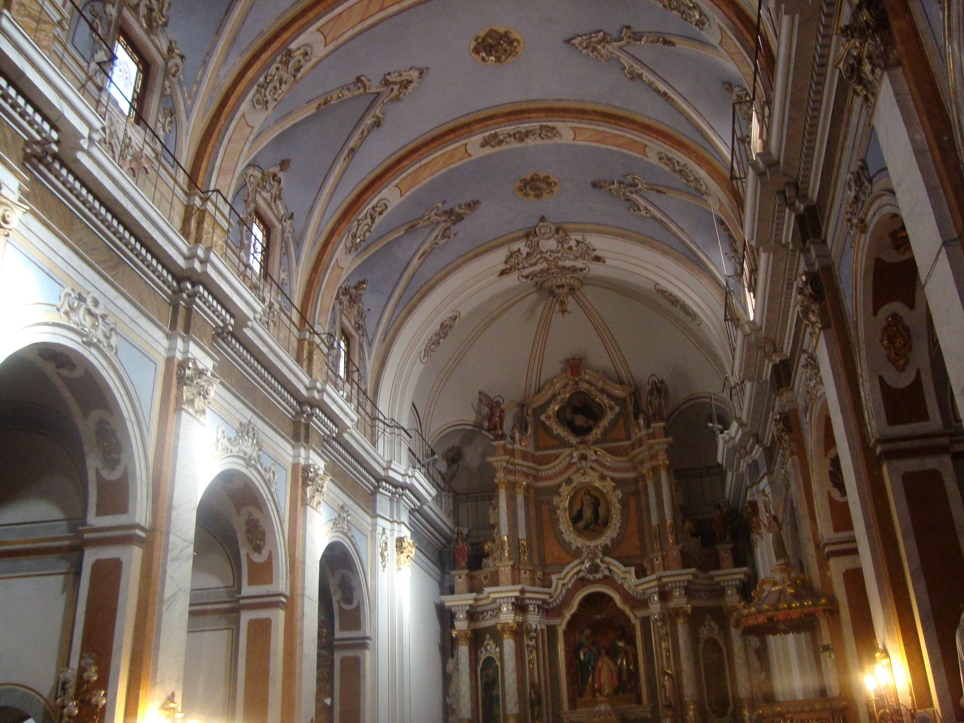 Interiores de la iglesia Parroquial de la Sagrada Familia de La Vilavella (Castellón)